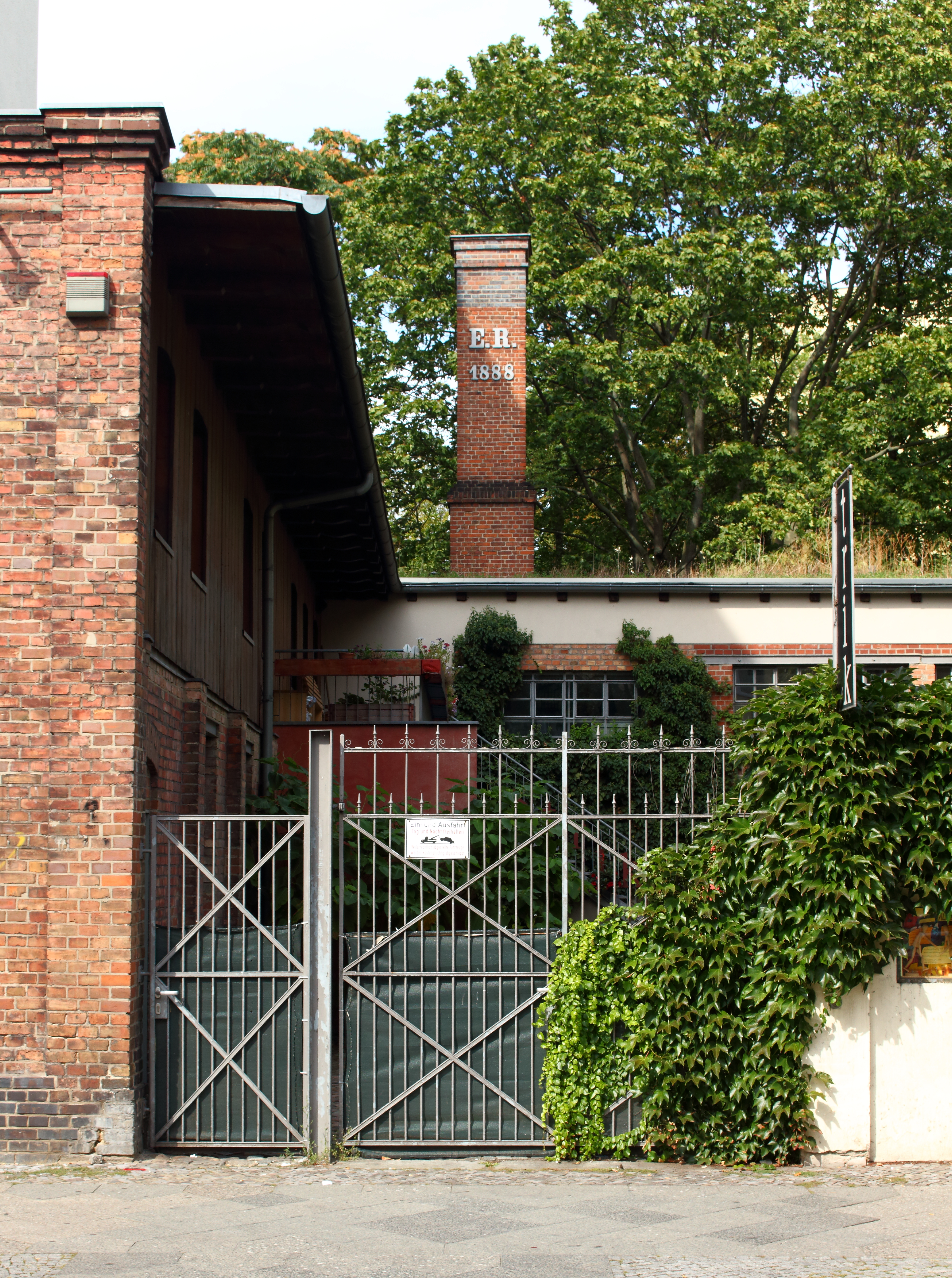 Zinkgießerei Liebenwalder Straße, Ansicht der Hofeinfahrt